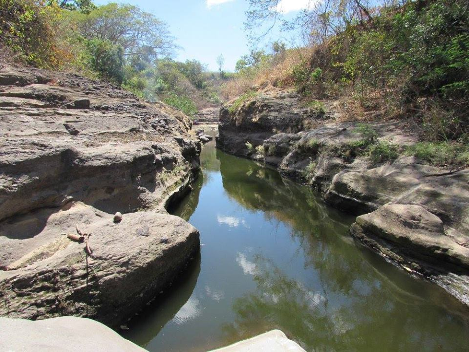 rECURSO nATURAL